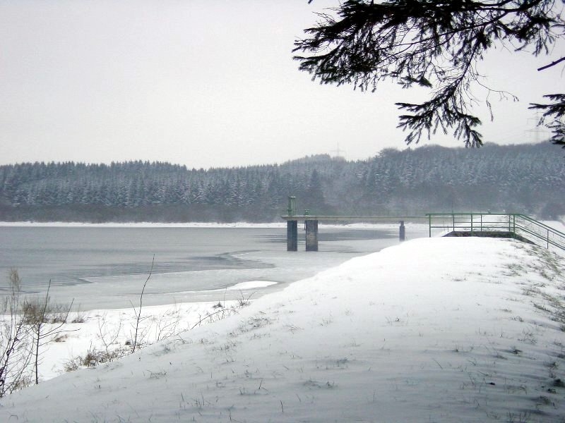 Krombach-Talsperre, Stausee und Staudamm im Winter